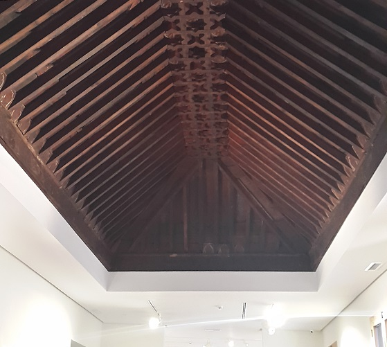 Almizate procedent del Palau de Pino Hermoso.